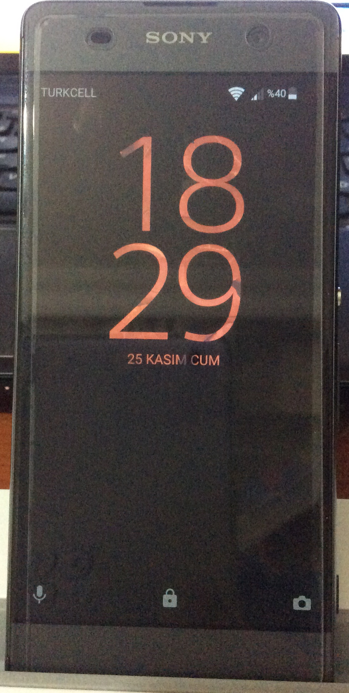 Sony Xperia XA cihazının görüntüsüdür.